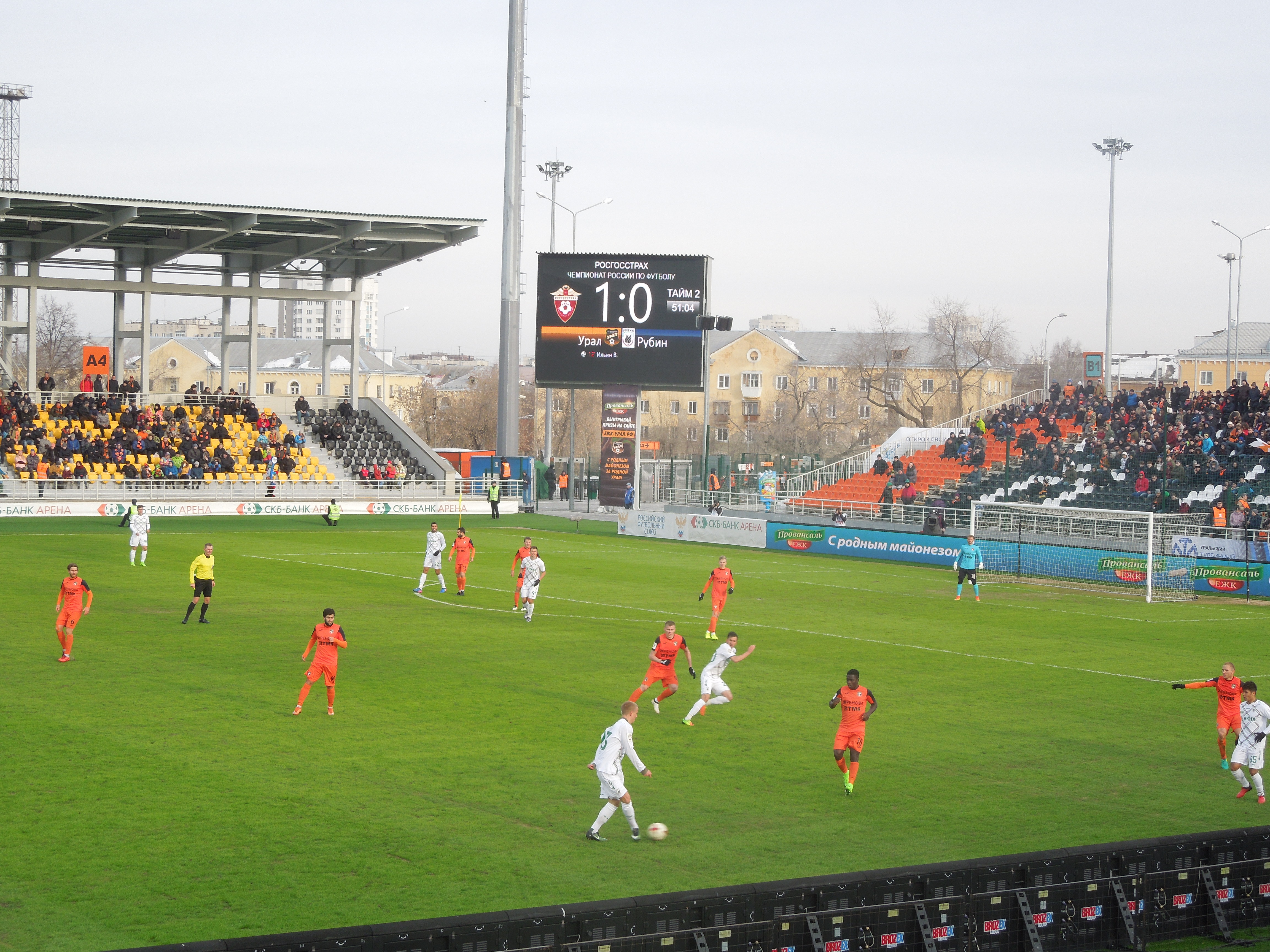 Матч "Урал" - ."Рубин", СКБ-Банк Арена